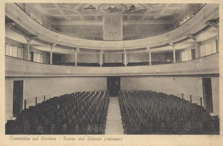 Teatro del Littorio (oggi Teatro del Popolo) a Concordia sulla Secchia